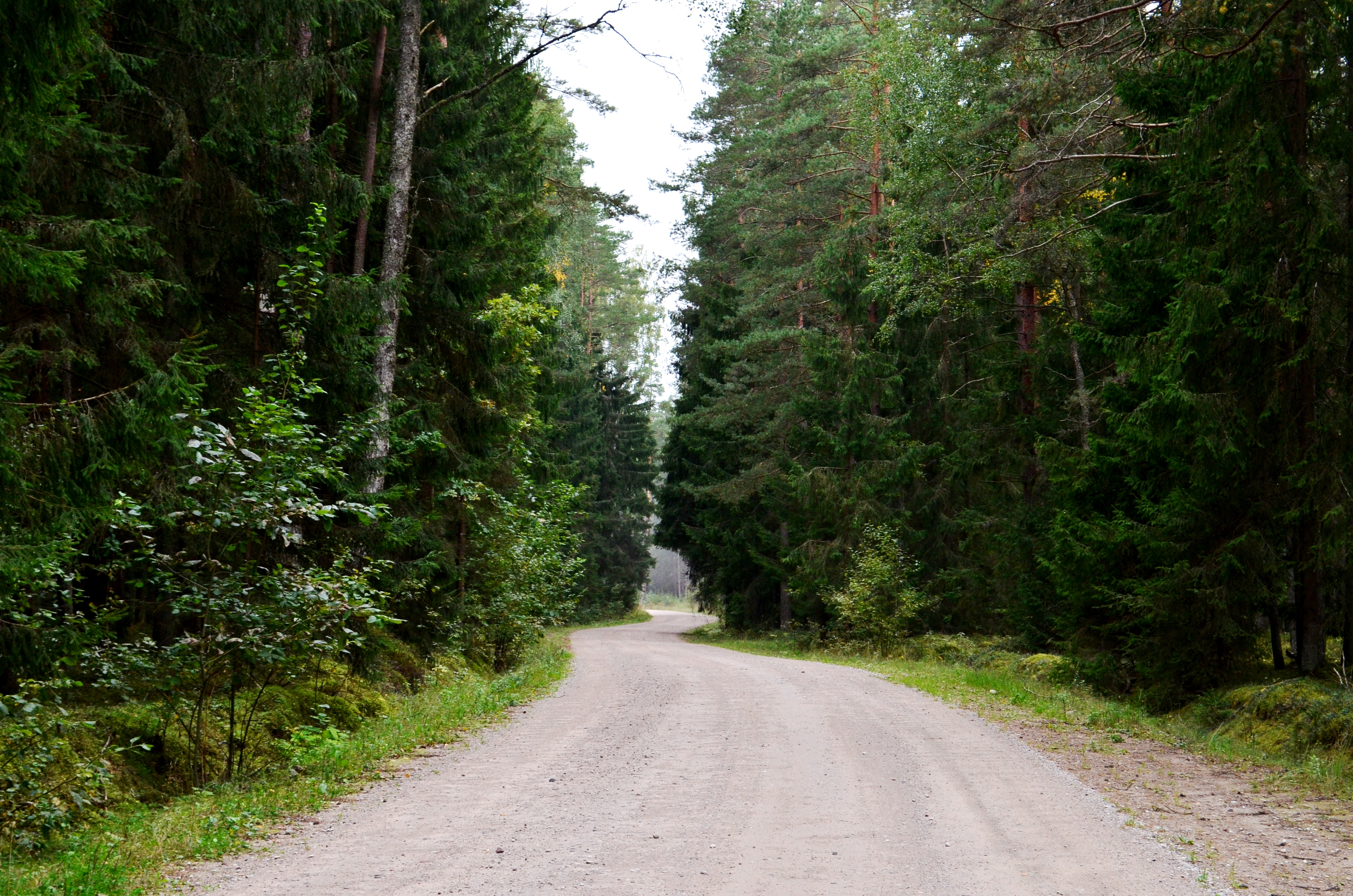 Kazlų Rūdos miškai (Kuro apylinkės), Kauno raj.